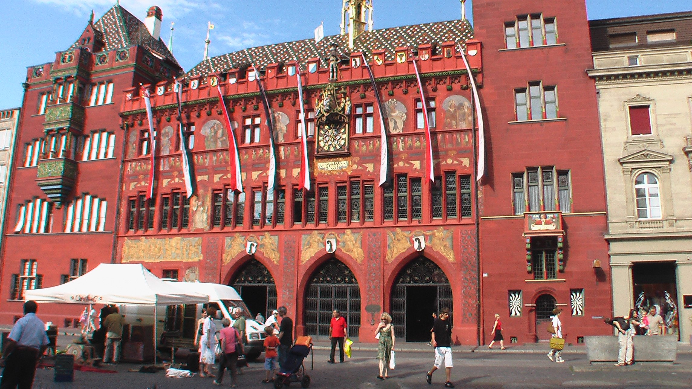 BaselHaus2008